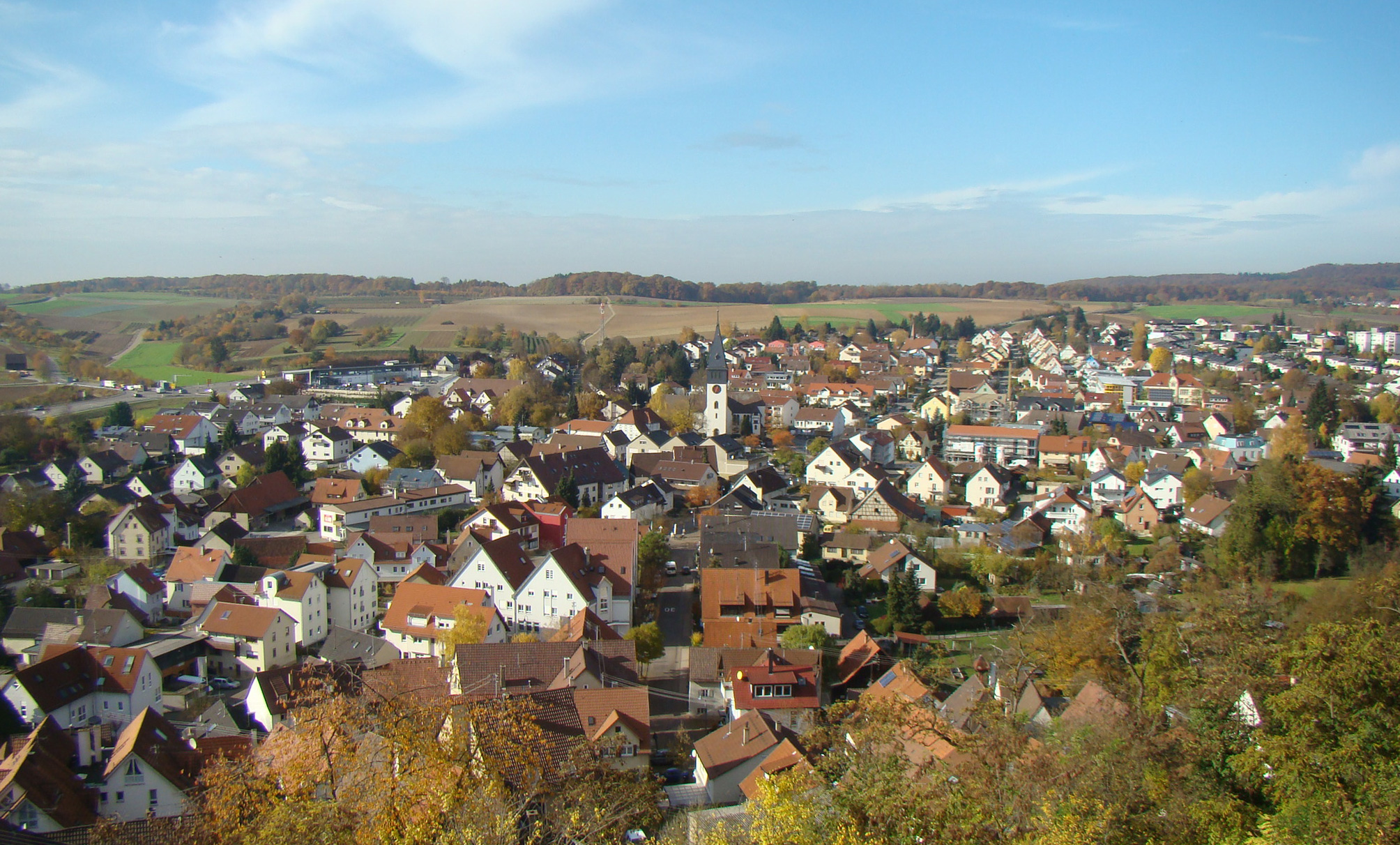 Untergruppenbach, Foto: Peter Schmelzle 2011